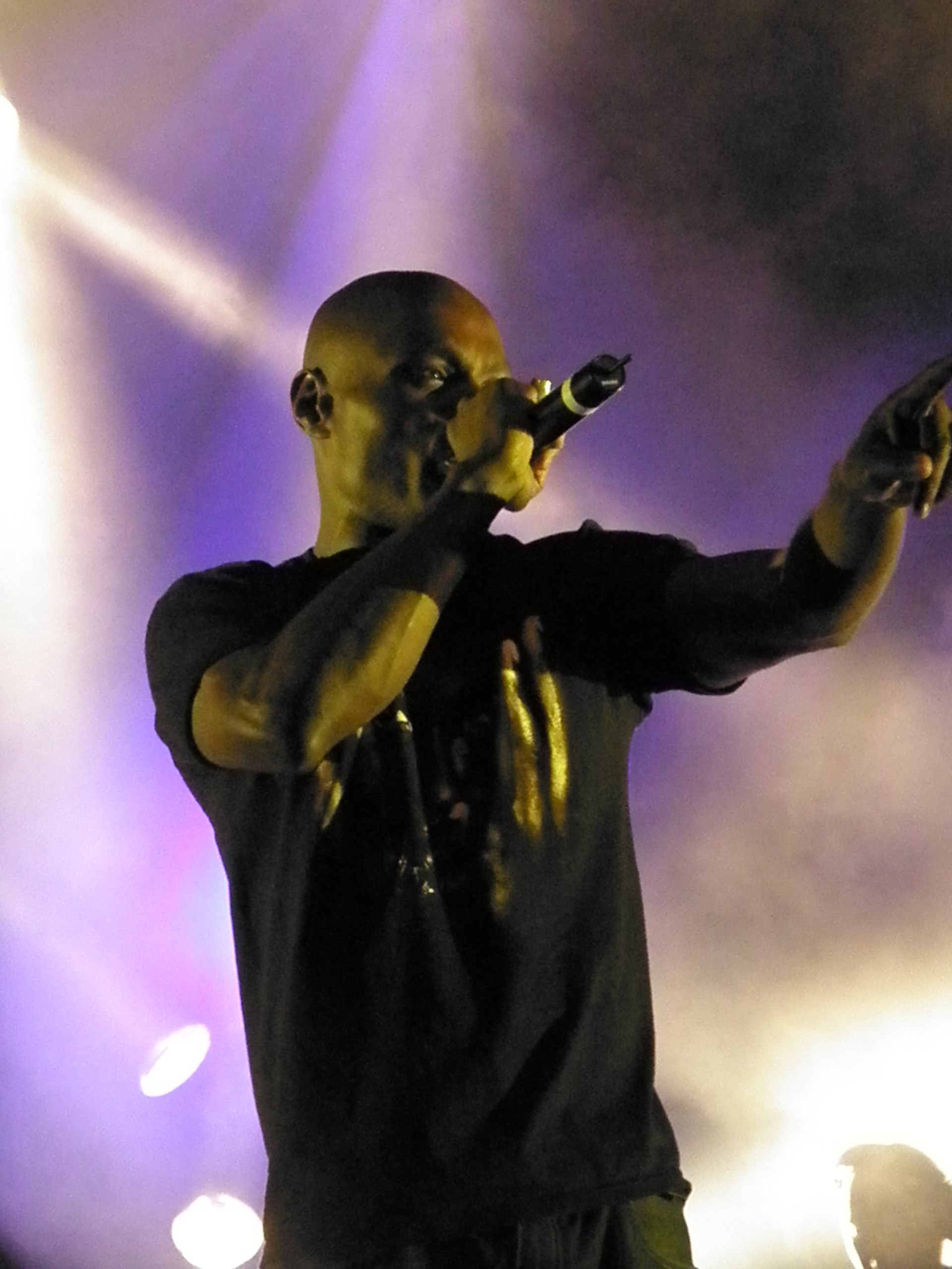 En savoir plus sur cet évènement